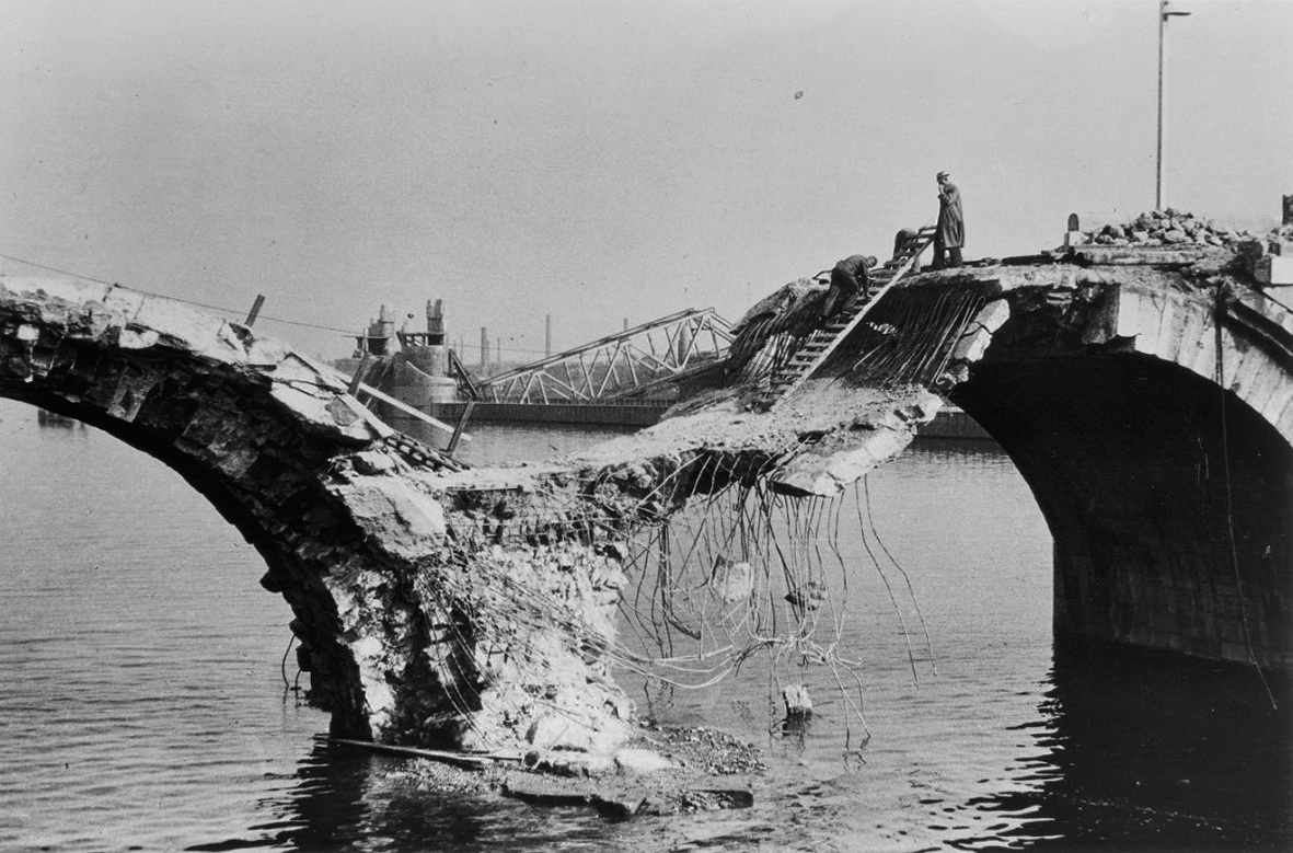 Maasbrug, Oud En Nieuw: na restauratie